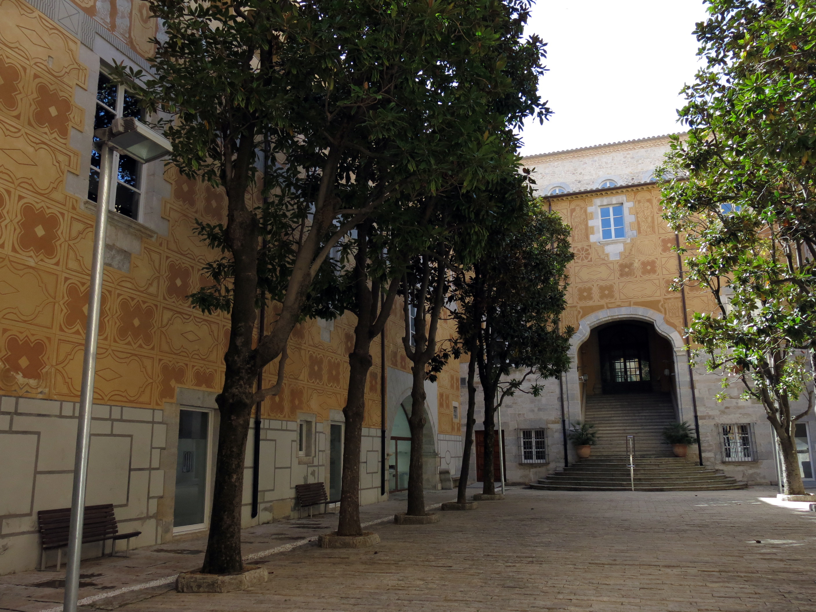 Hospital Provincial de Santa Caterina (Girona)